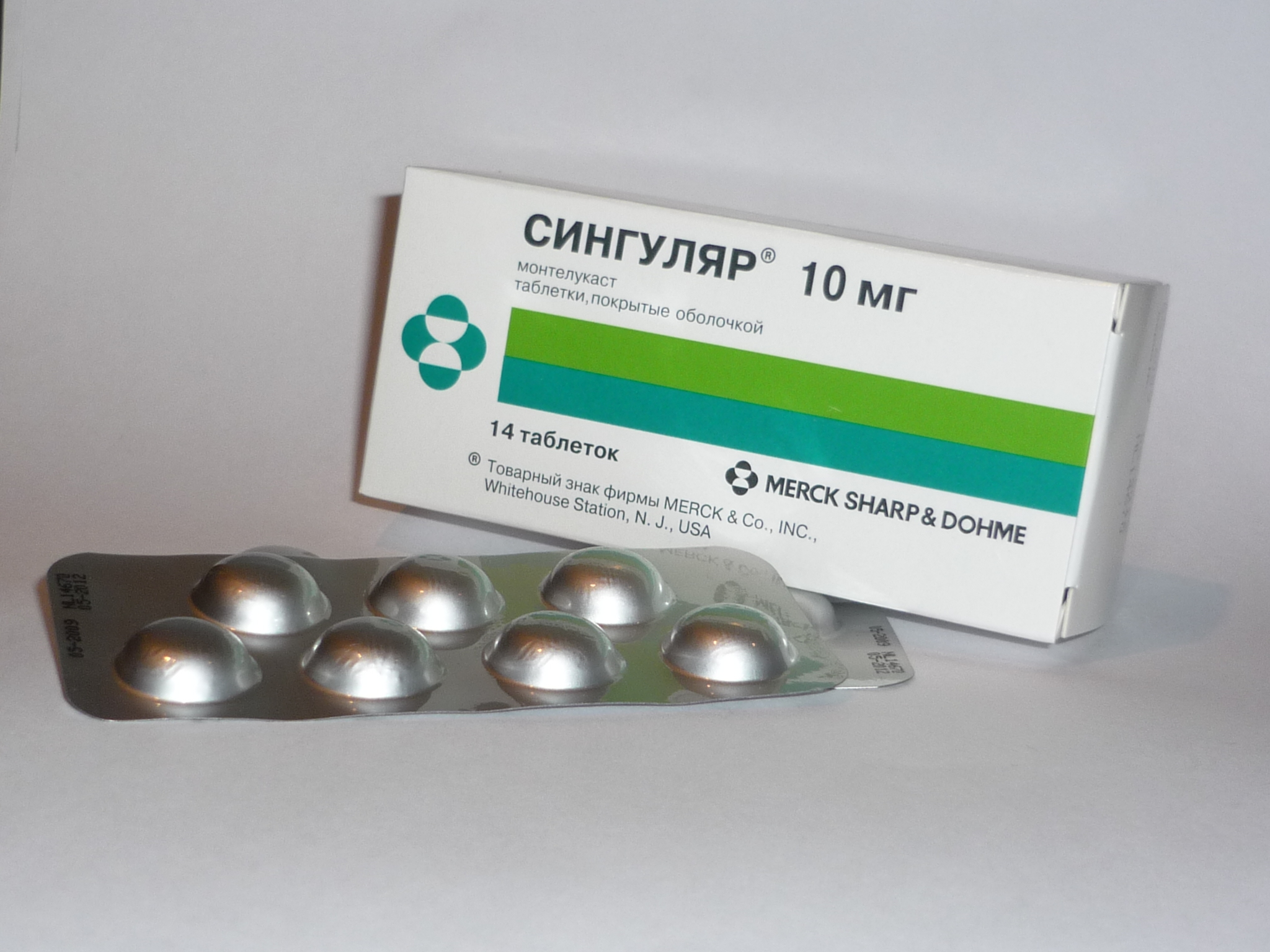 Сингуляр, упаковка таблеток